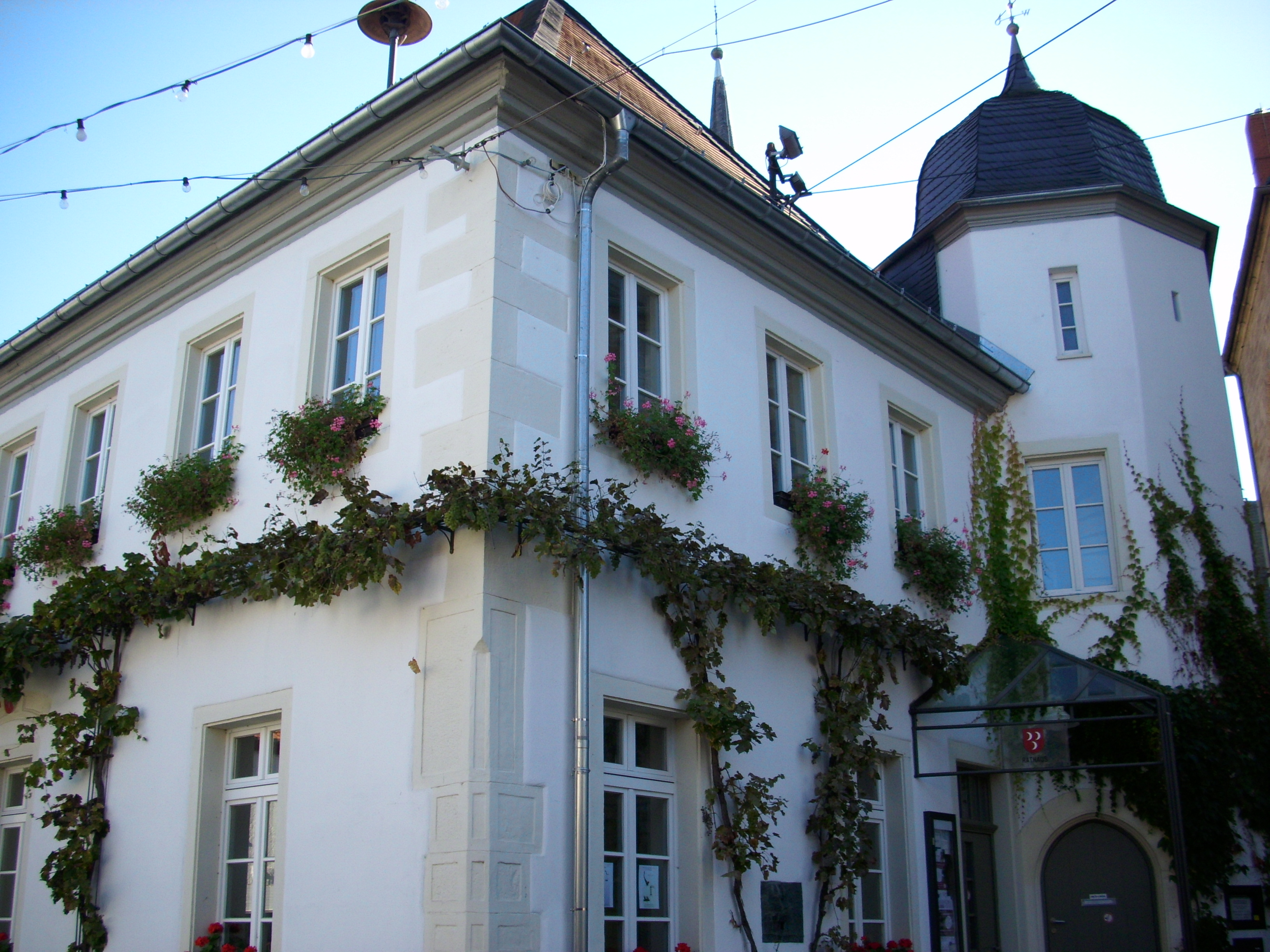 Renaissancebau, Treppenturm, bezeichnet 1571, Überformung des 18. Jahrhunderts